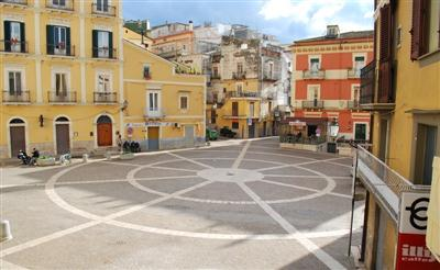 Descrizione: Piazza di Carpino Autore: Domenico Sergio Antonacci Data pubblicazione: 12/12/2009